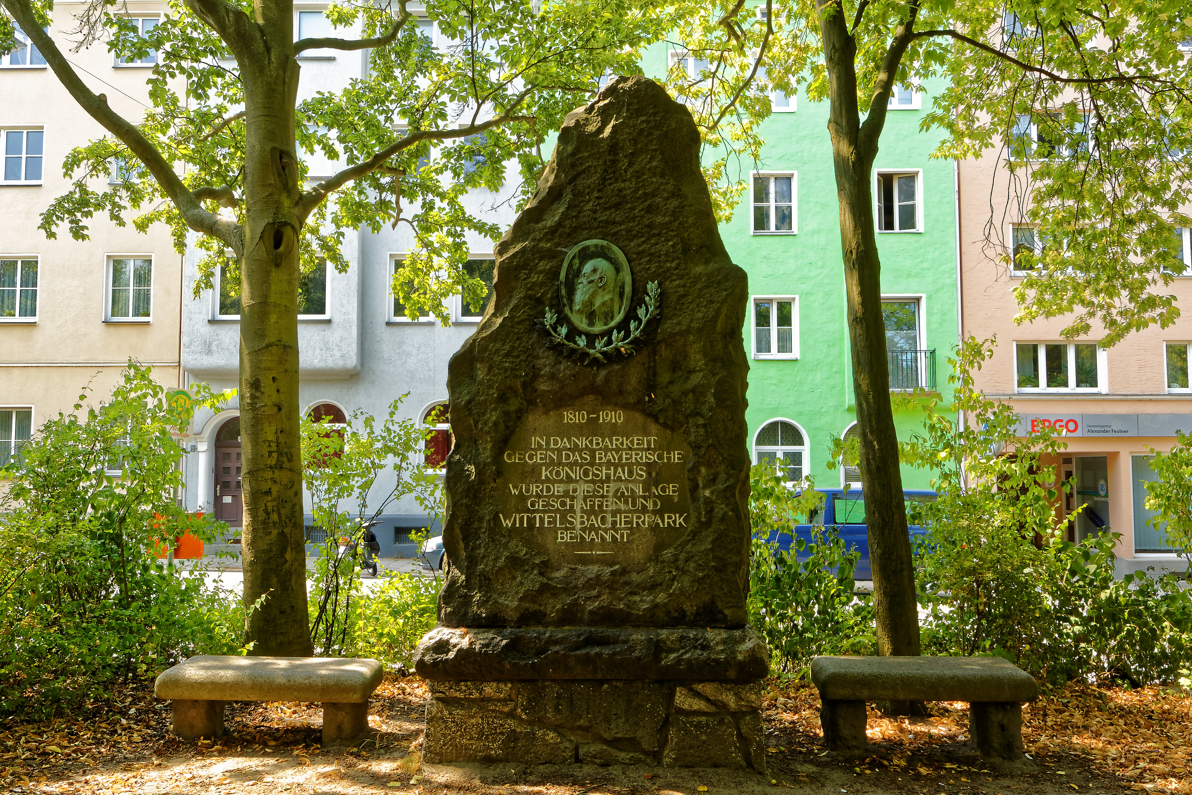 Zwischen Sophienstraße 23 und Wörthstraße 18 im Wittelsbacher Park, Gedenkstein zum Jubiläum der Angliederung an Bayern, in Hof/Saale mit Denkmal-Nr.D-4-64-000-219 Monolith auf Natursteinsockel mit Bronzeporträt des Prinzregenten Luitpold, zugehörige Steinbänke, 1910; 1909/10 angelegt (Monolith mit Steinbänken)This is a photograph of an architectural monument.